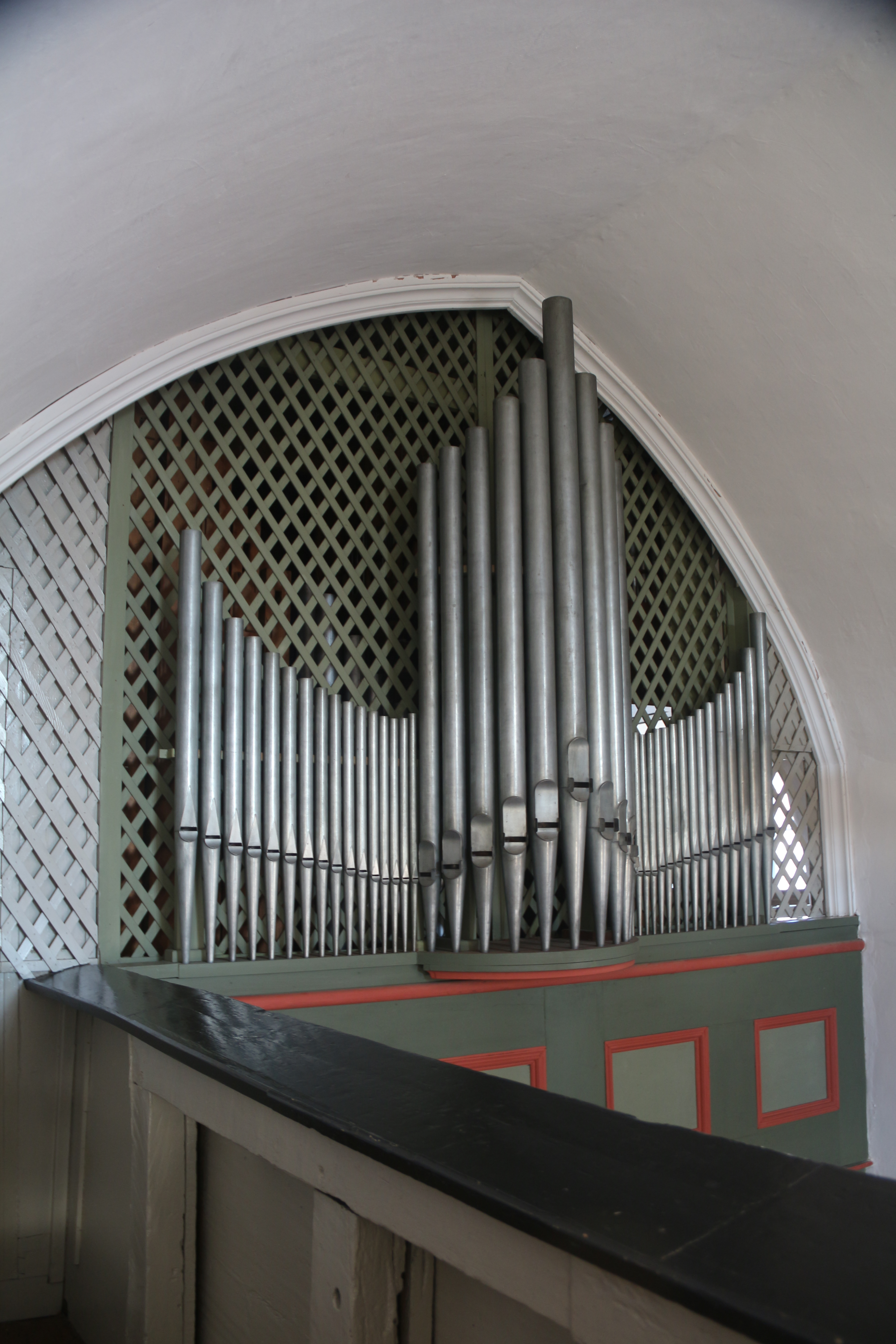 Ev. Kirche Krumbach